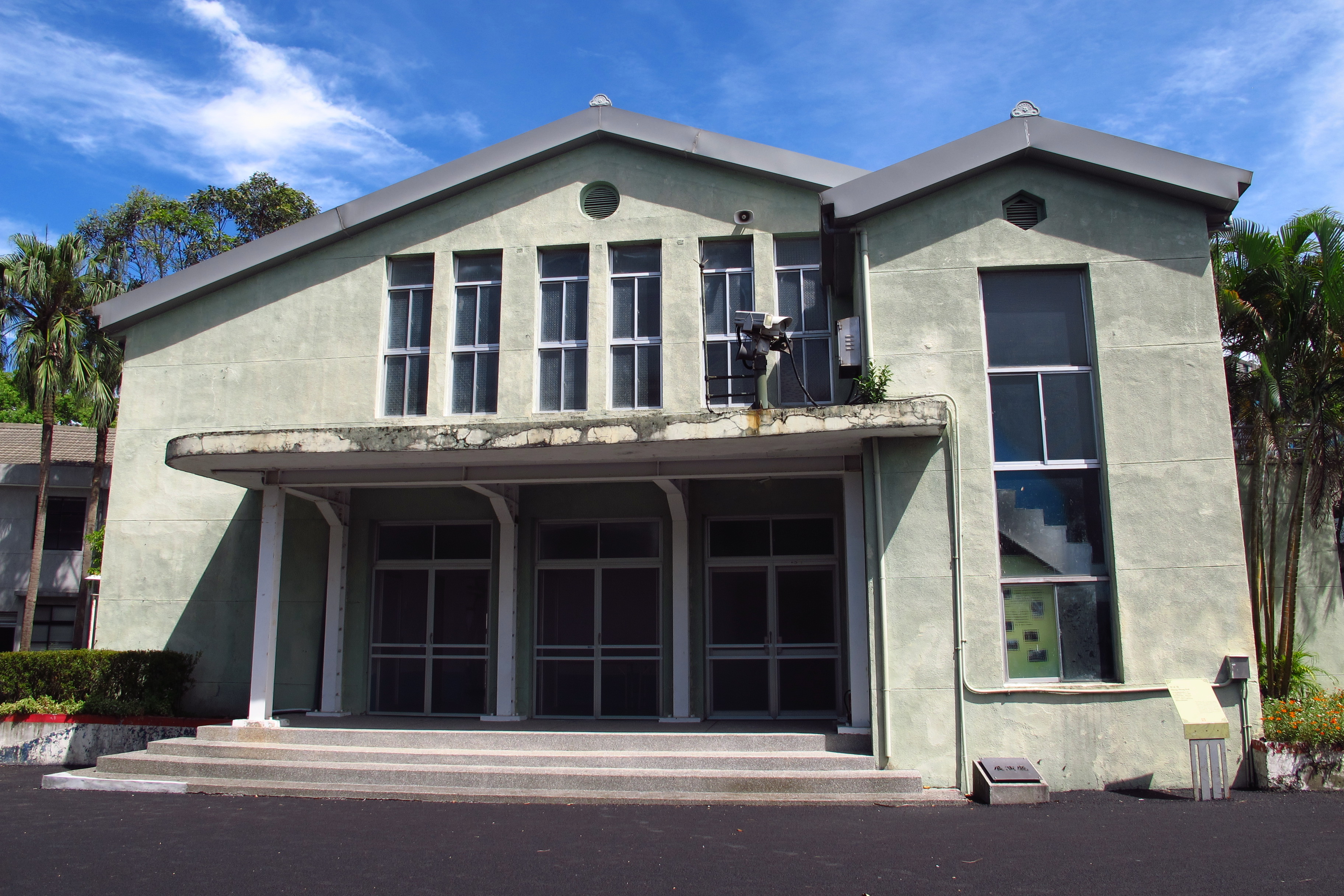 新店二十張景美軍事看守所中正堂